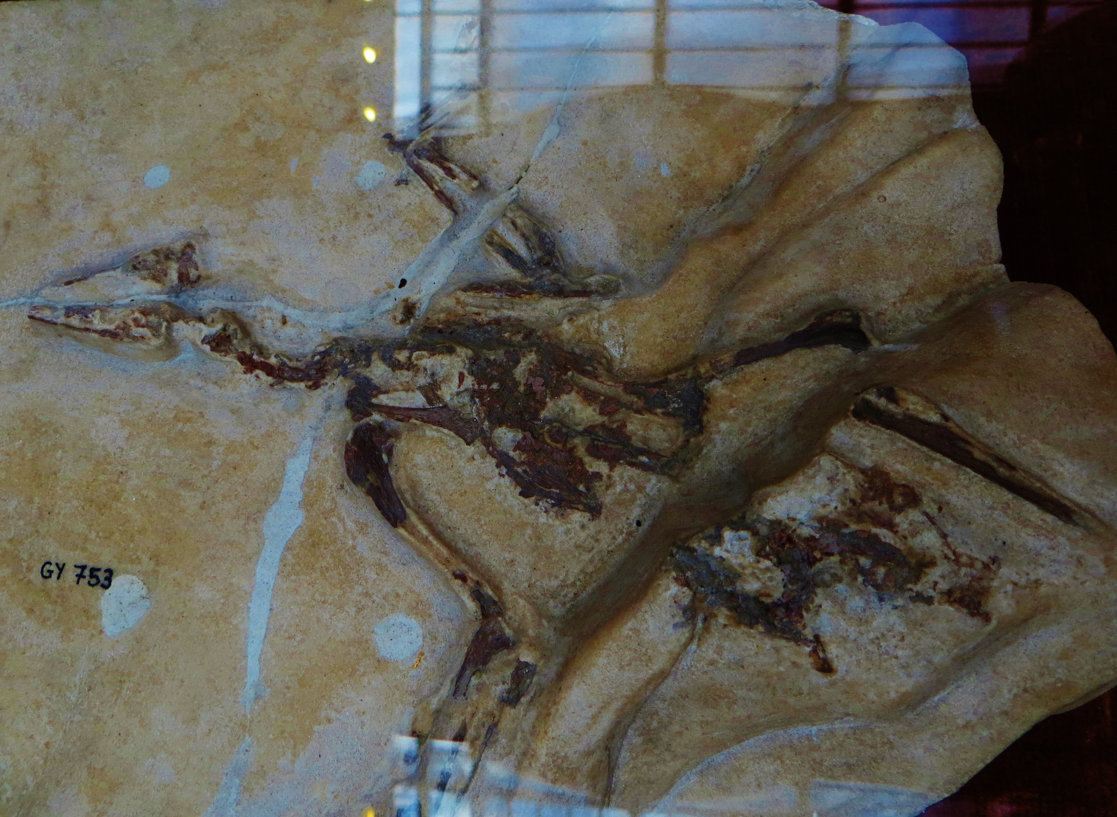 Fossil of Palaeortyx, an extinct bird- Took the photo at Musee d'Histoire Naturelle, Paris